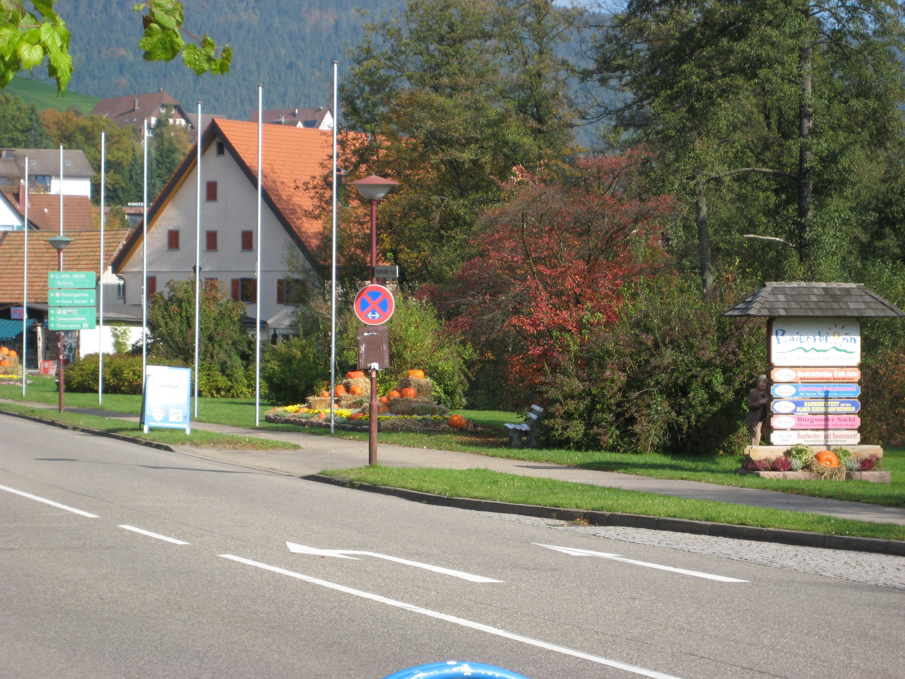 Baiersbronn.